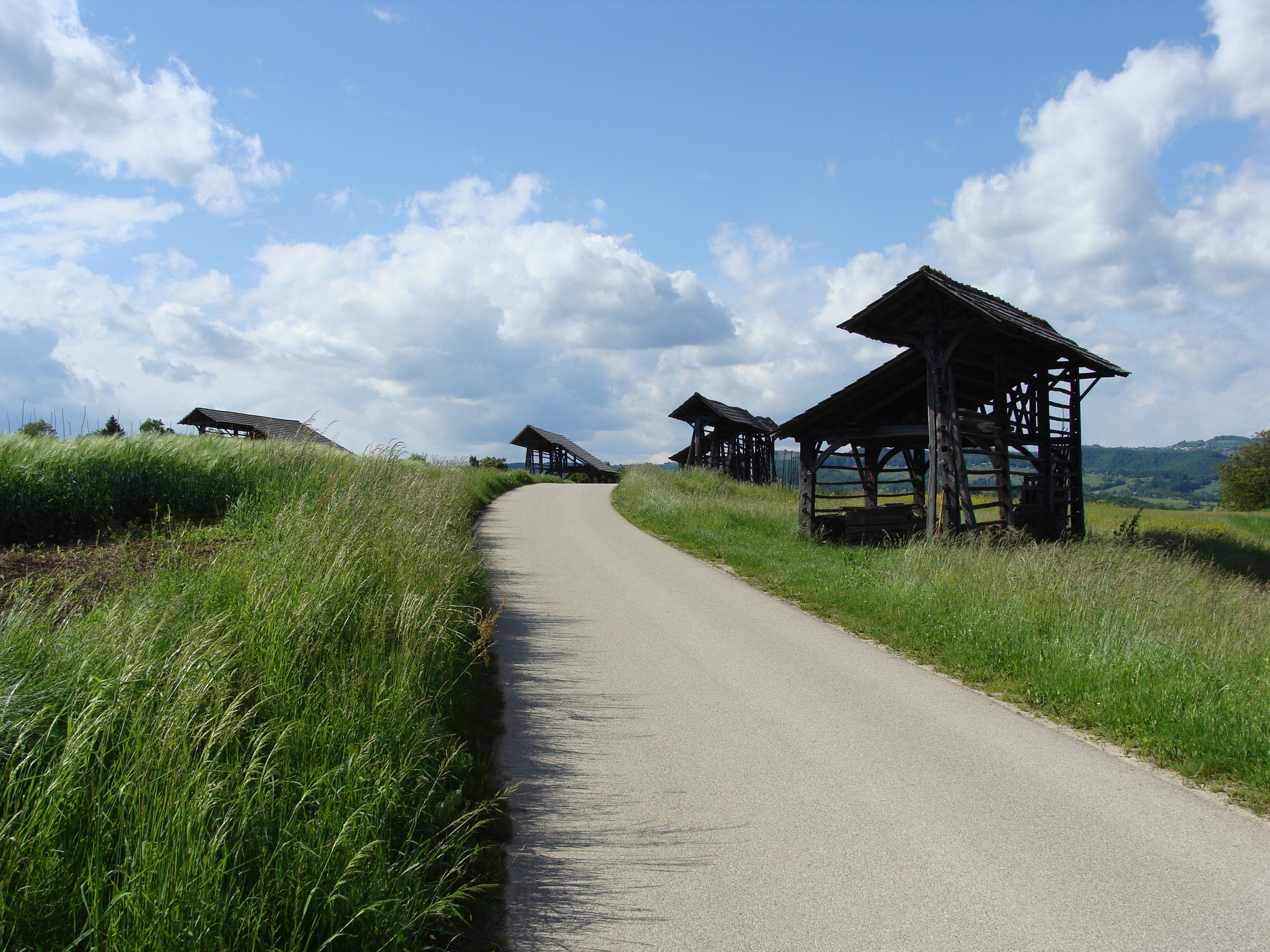 kozolci v vasi Vinica pri Šmarjeti